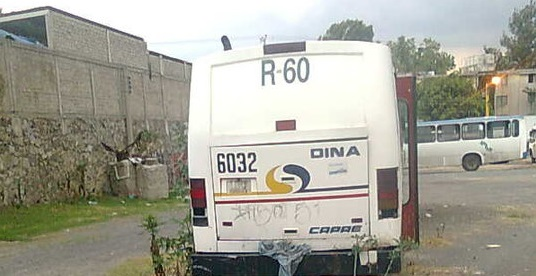 Autobús urbano de la ciudad de Guadalajara, México en estado de abandono